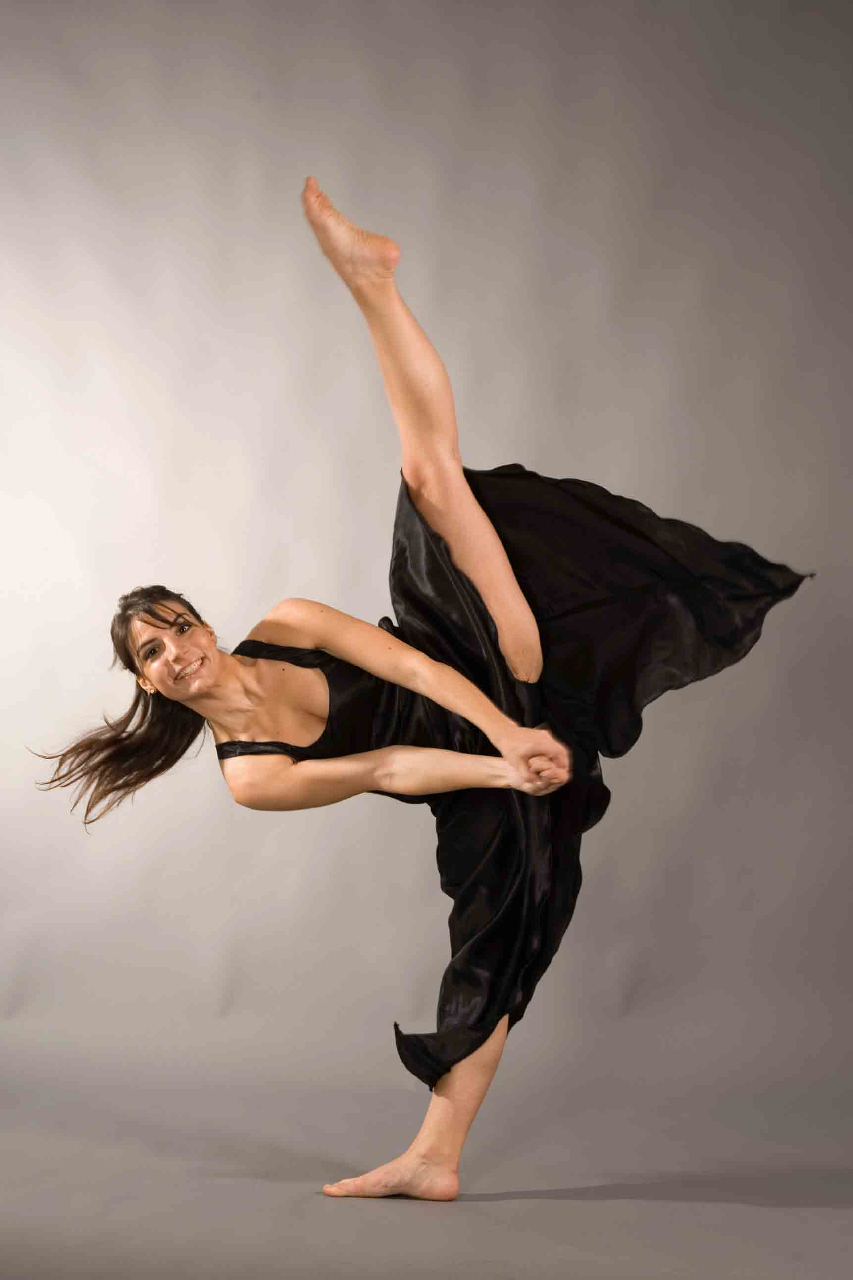 Foto Video Project, Foto Video Project, ballerina in fuori asse alla seconda, licenza GFDL